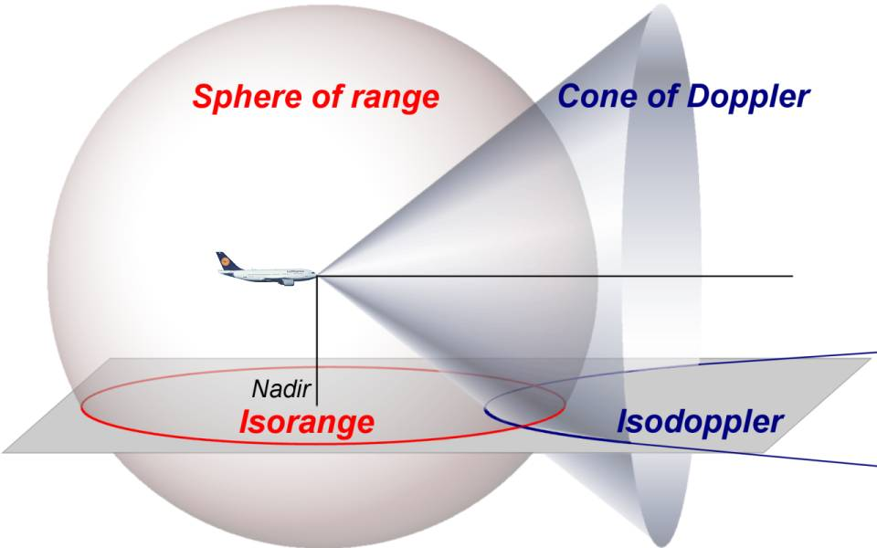 Cone of Doppler, Isodoppler and sphere of range, isorange